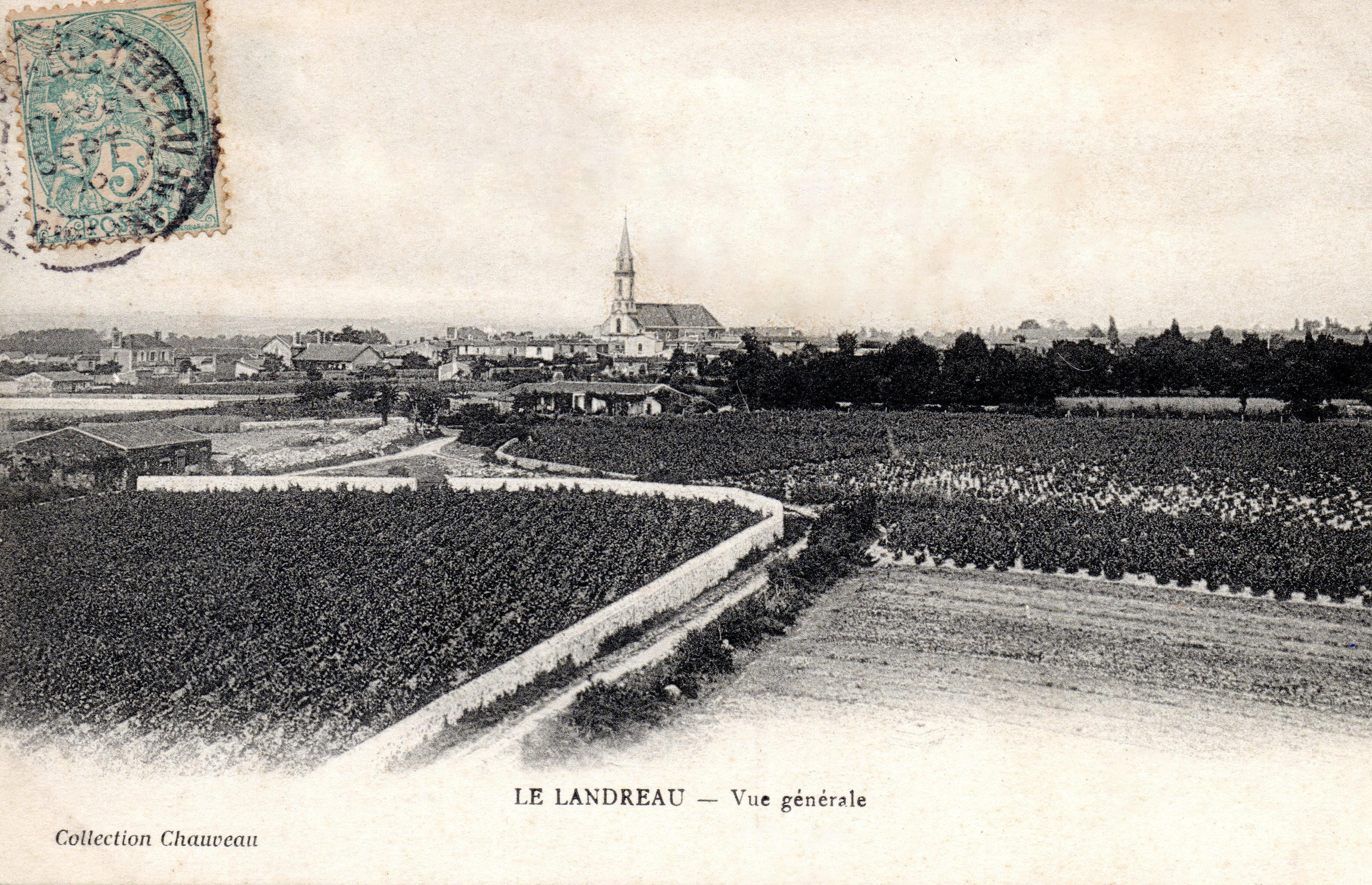 Le bourg, vu du Moulin-de-Beauchêne, vers 1910, Le Landreau.